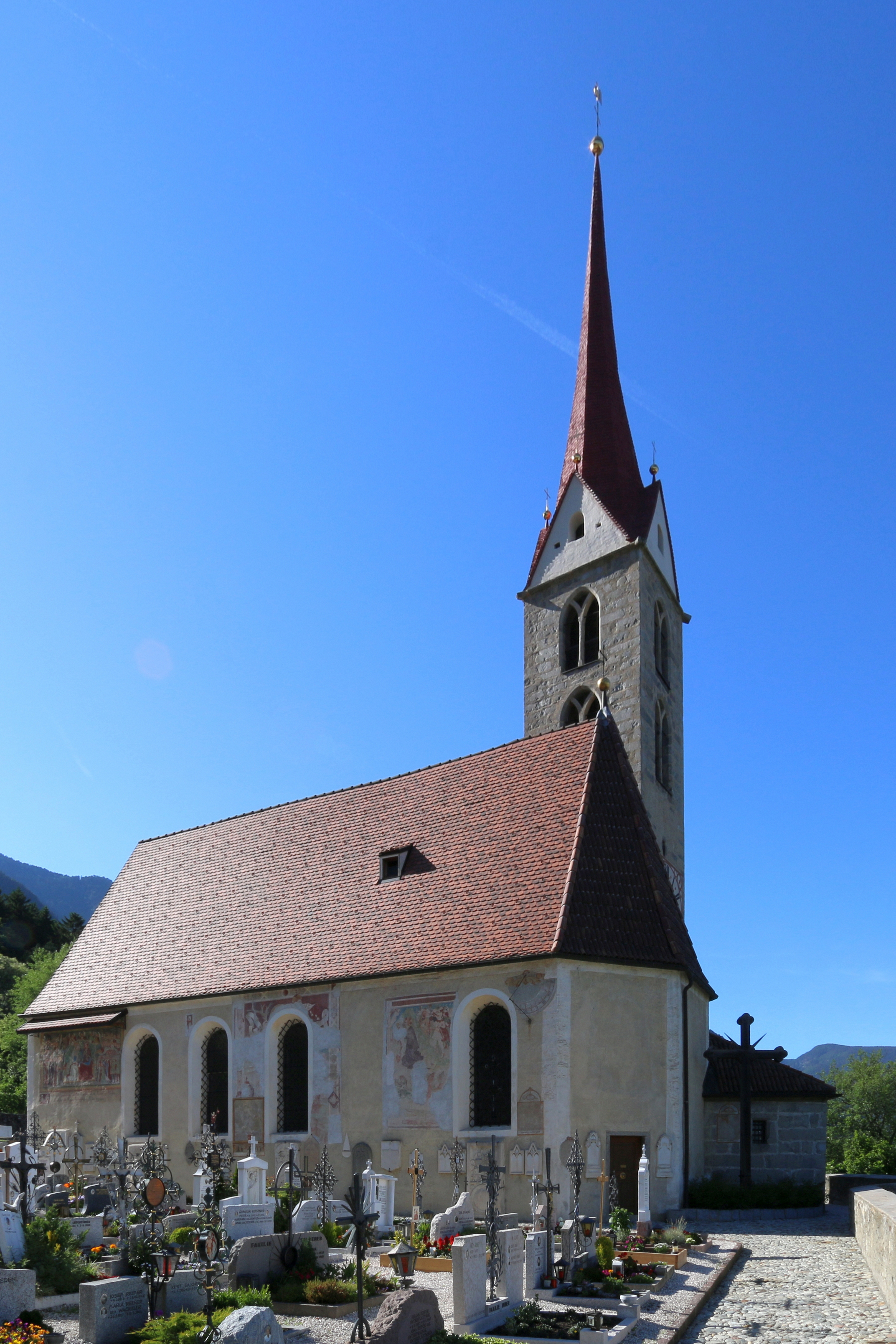 Vahrn, Südtirol: Pfarrkirche St. Georg